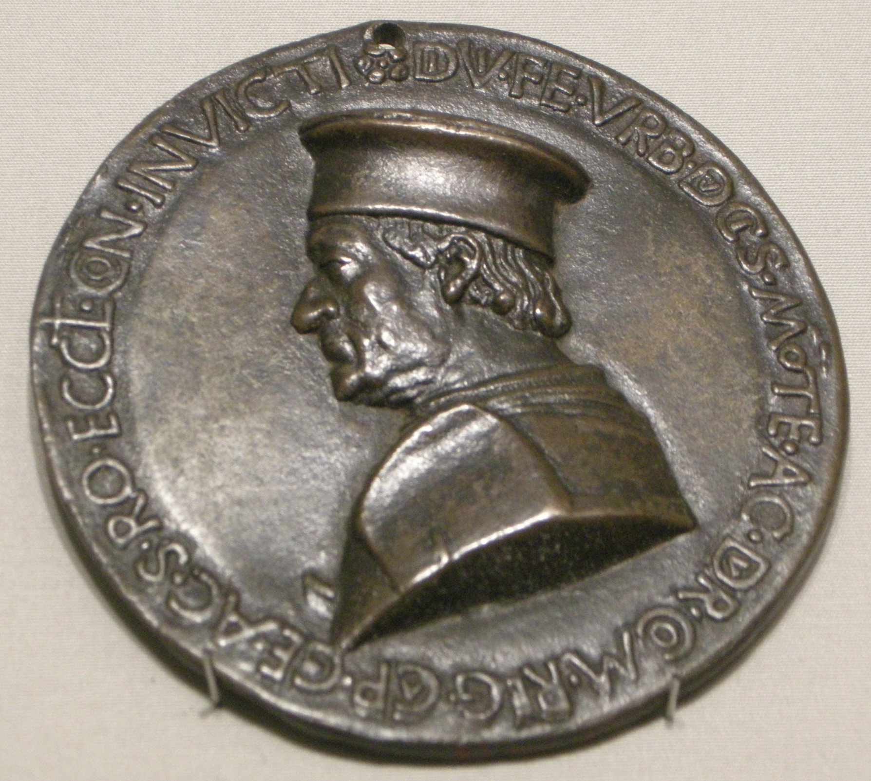 Medaglia di Federico da Montefeltro (1422-1482), 1482 circa